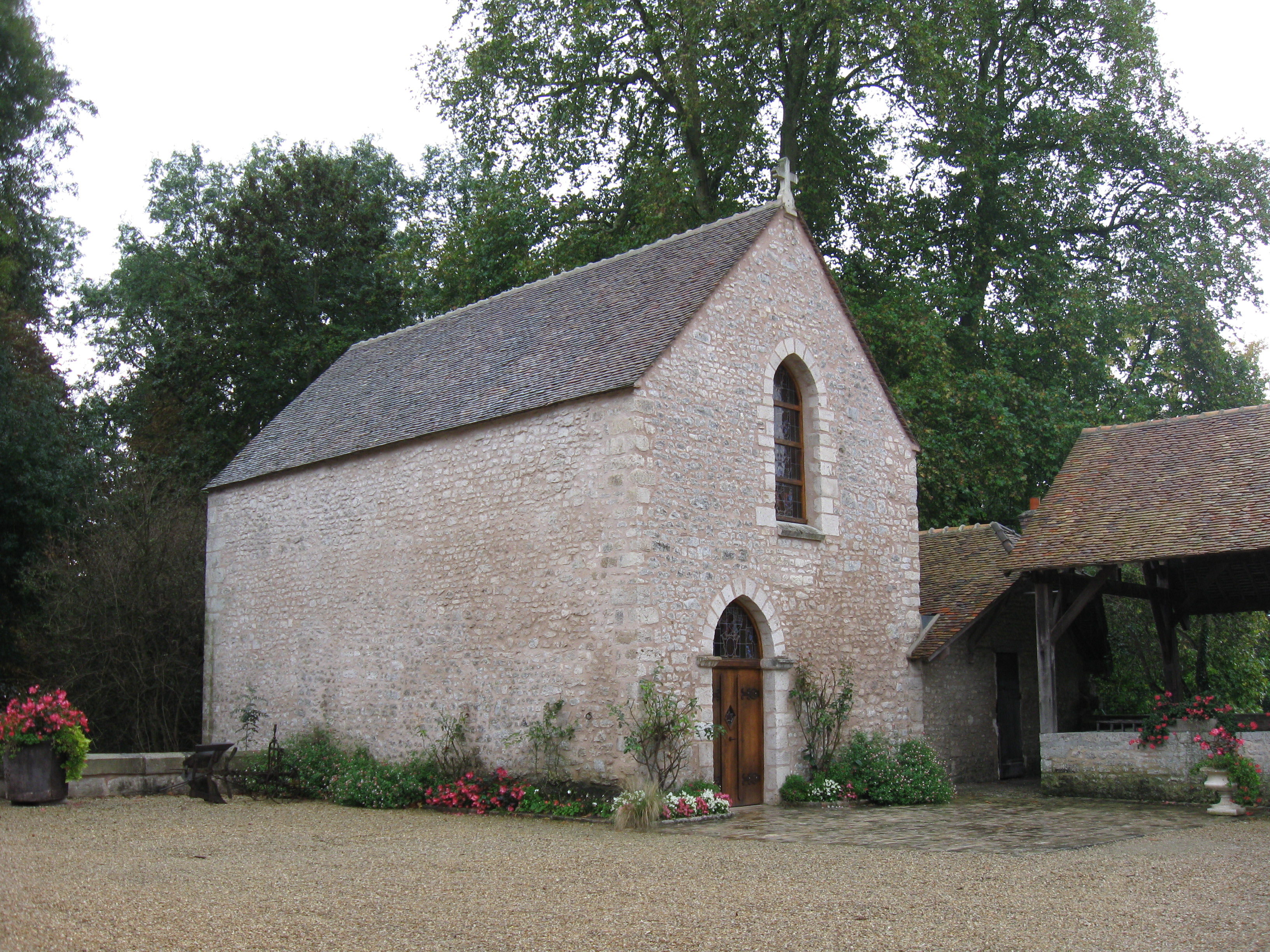 Chapelle de l'abbaye de Cercanceaux. (Souppes-sur-Loing, Seine-et-Marne, région Île-de-France).